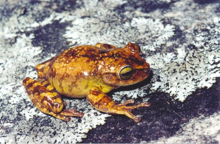 Bokermannohyla nanuzae